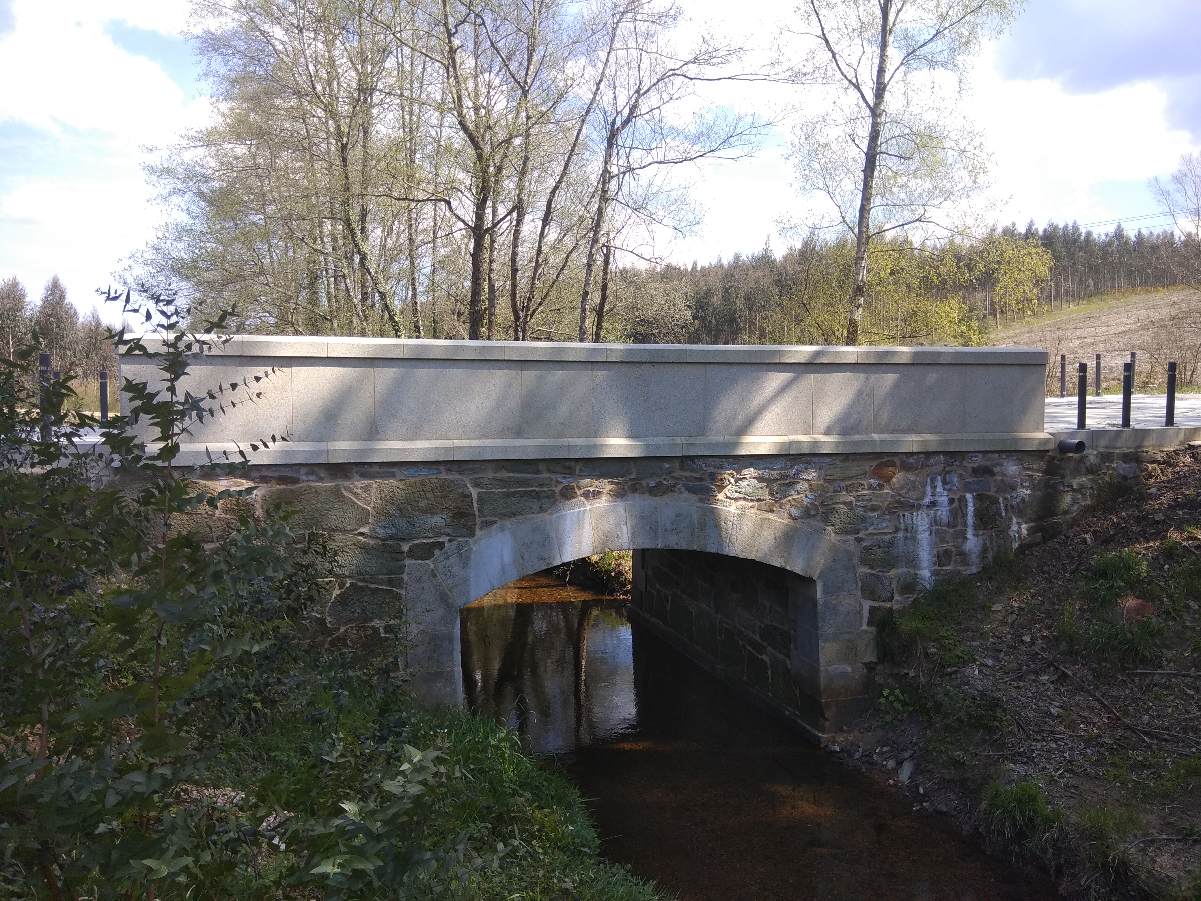 Ponte sobre o río Maruzo na parroquia de Lanzá, Mesía, Galiza.